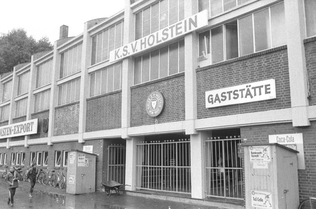 Eingang Westring.